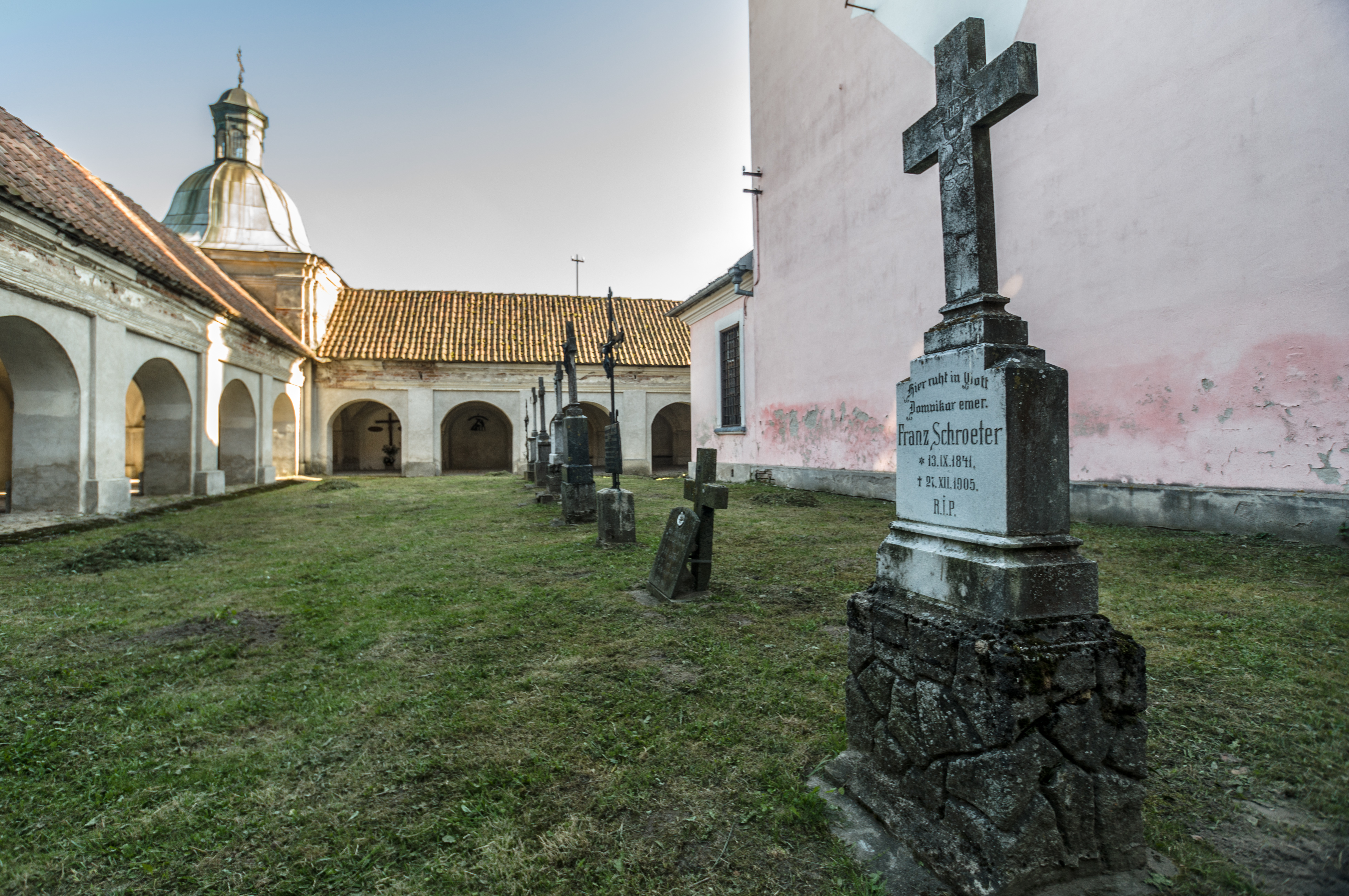 Cmentarz na tyłach kościoła odpustowego p.w. Nawiedzenia NMP i św. Józefa w Krośnie (pow. lidzbarski). Na pierwszym planie nagrobek: Hier ruht in Gott Domnikor emer. Franz Schroeter, 13.IX.1841, 27.XII.1905, R.I.P.